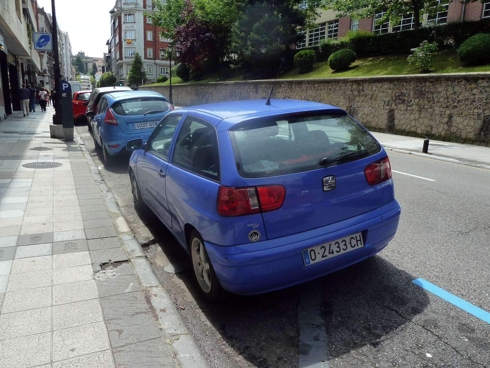 SEAT Ibiza 6K2-GP01